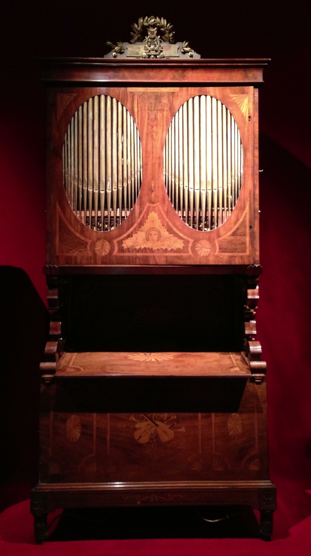 Orgue de resort del constructor Diego Evans: Un ressort és un operador elàstic (una molla) capaç d'acumular energia i desprendre-se'n sense patir deformacions permanents quan acaben les forces o la tensió aplicades. Aquests es fan servir per absorbir energia (càrregues de xoc) o com a font d'energia per a produir una força de pressió. El suport programat és un corró de fusta amb pues, canviable, amb deu peces programades. Disposa de quatre corrons de recanvi. La generació del so es produeix amb quatre jocs de tubs d'orgue, dels quals tres són de metall i un de fusta, que formen un conjunt de 116 tubs.